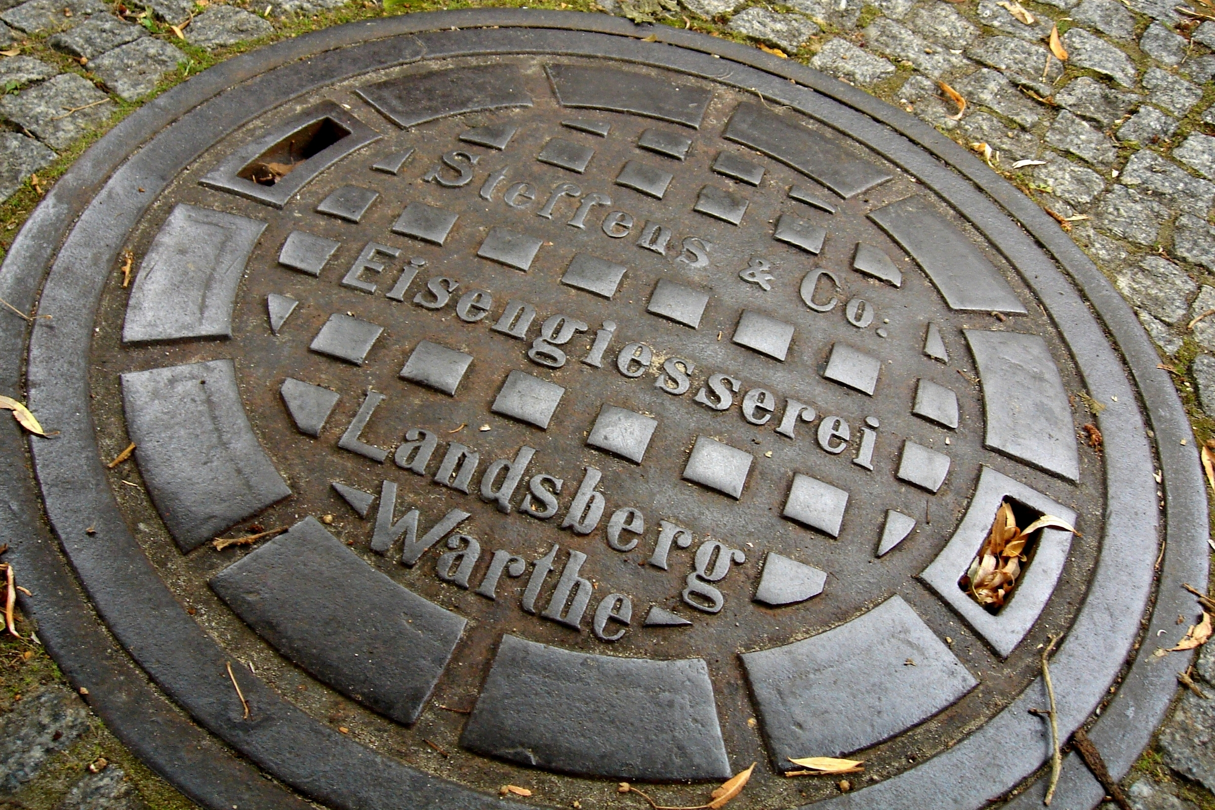 Pokrywa studni kanalizacji sanitarnej w Gorzowie Wlkp. z dawną nazwą miasta (I poł. XX w.)